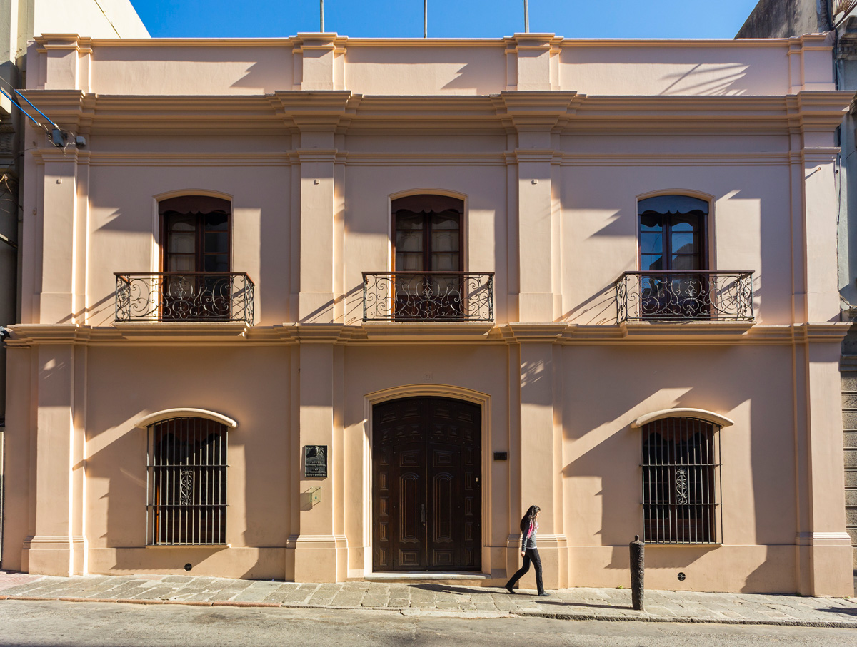 Casa del Brig. Gral. Juan Antonio Lavalleja - Museo Histórico Nacional. Ubicada en el departamento de Montevideo